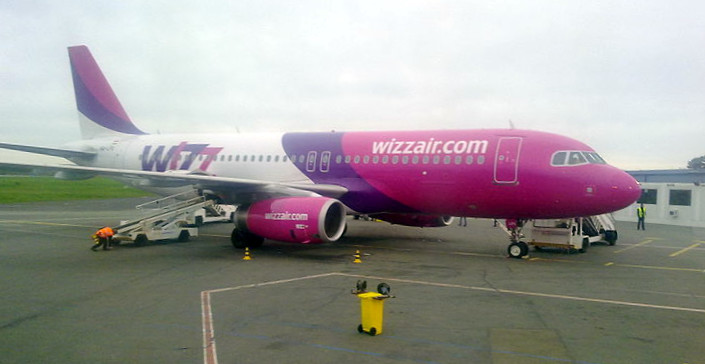 Airbus A320 Wizz Air à l'aéroport de Beauvais le 3 avril 2011.